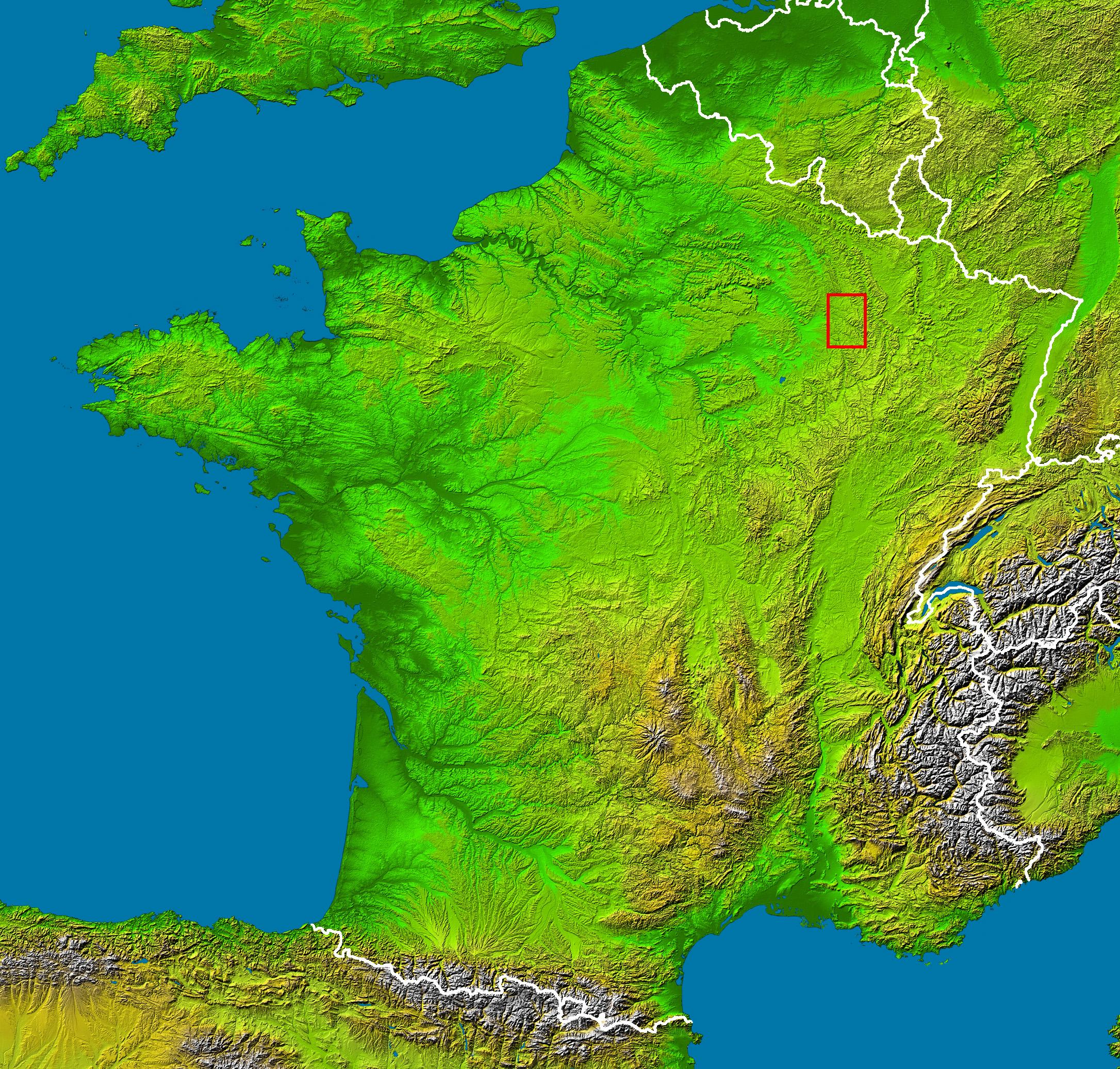 Catégorie:Carte de France